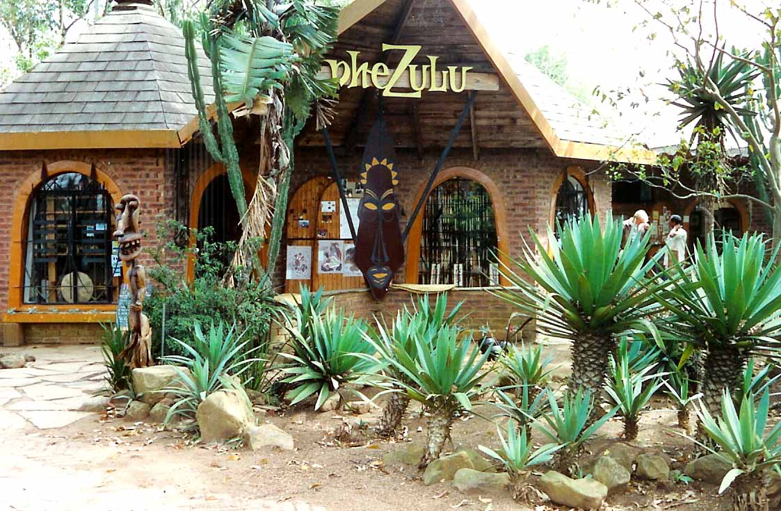 Zuluduerf